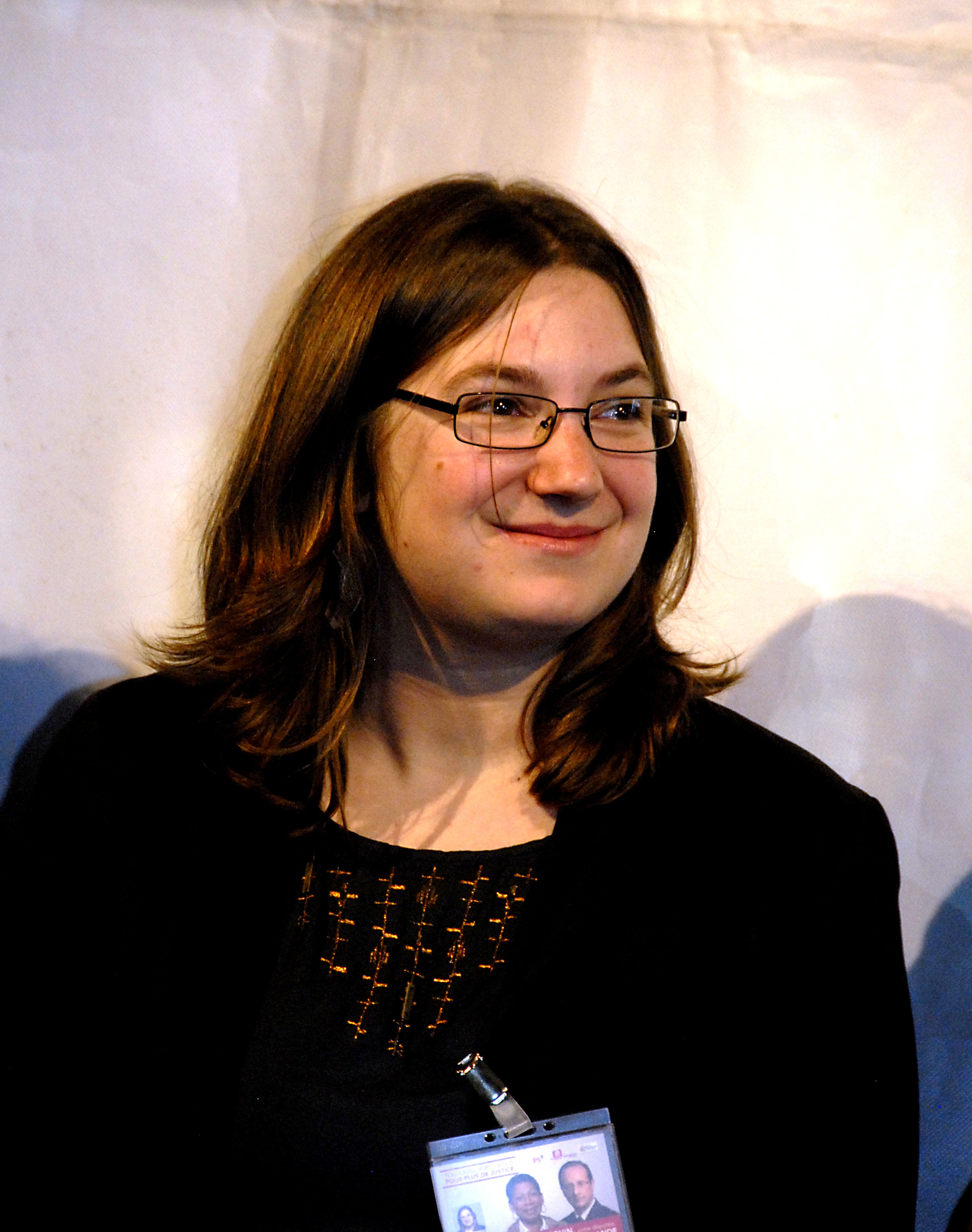 Photo de Fanélie Carrey-Conte à l'événement de lancement de la campagne législative 2012 de George Pau-Langevin.